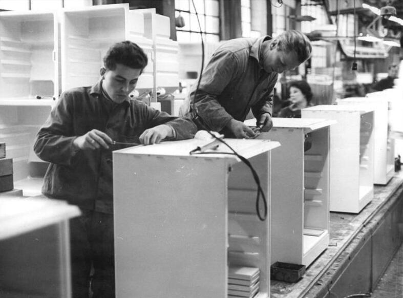 Zentralbild-Gahlbeck 14.2.1964 Neue Haushaltskühlschränke unter Verwendung von Plaste; 110 000 Haushaltskühlschränke vom Typ Kristall 140 werden in diesem Jahr im VEB Deutsche Kraft- und Kühlanlagen Scharfenstein das Fließband verlassen. Innerhalb kürzester Zeit wurde dieser Typ von einer sozialistischen Arbeitsgemeinschaft unter weitgehender Verwendung von Plaste entwickelt und in die Serienproduktion überführt. Unser Bild zeigt das moderne Fließband, auf dem die Kühlschränke montiert werden. Durch den Einsatz von Plasten wurde ein bedeutend größerer Innenraum bei gleichbleibender Außenabmessung erzielt.